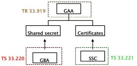 Subniveles de GAA